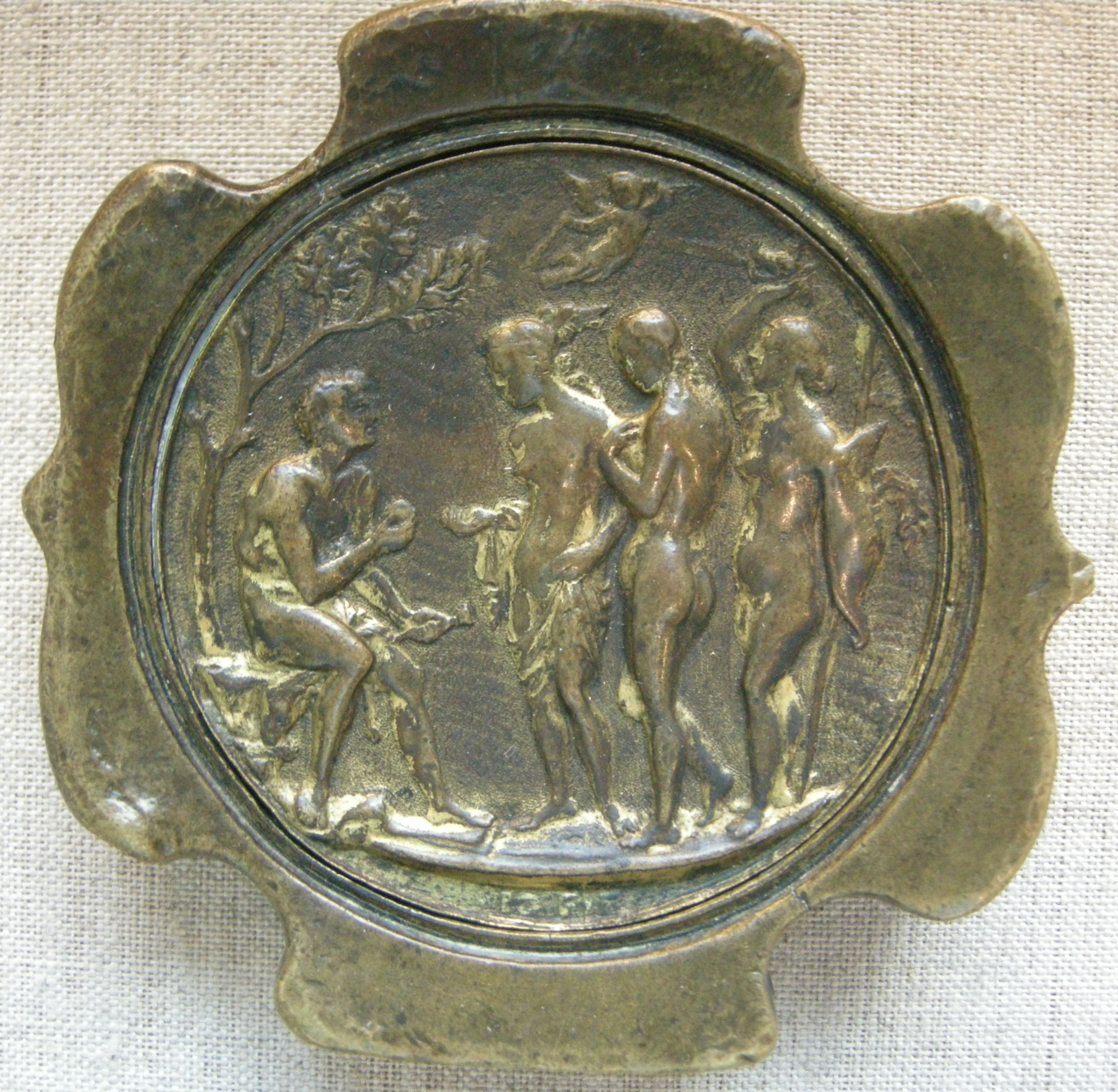 Giovanni di fondulino fonduli, giudizio di paride, 1470-1490 circa